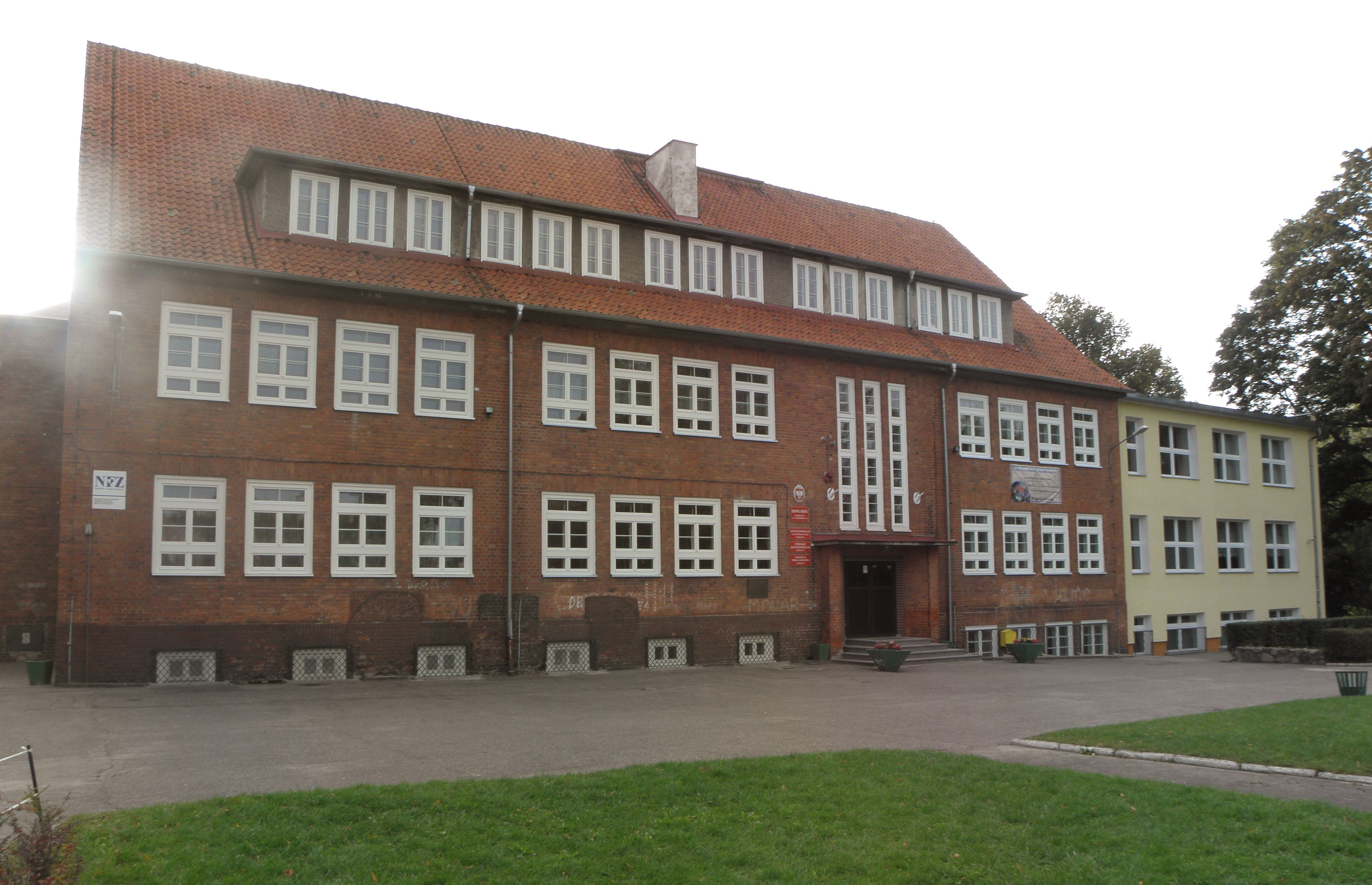 Budynek I LO. Gmina Biskupiec, powiat olsztyński.